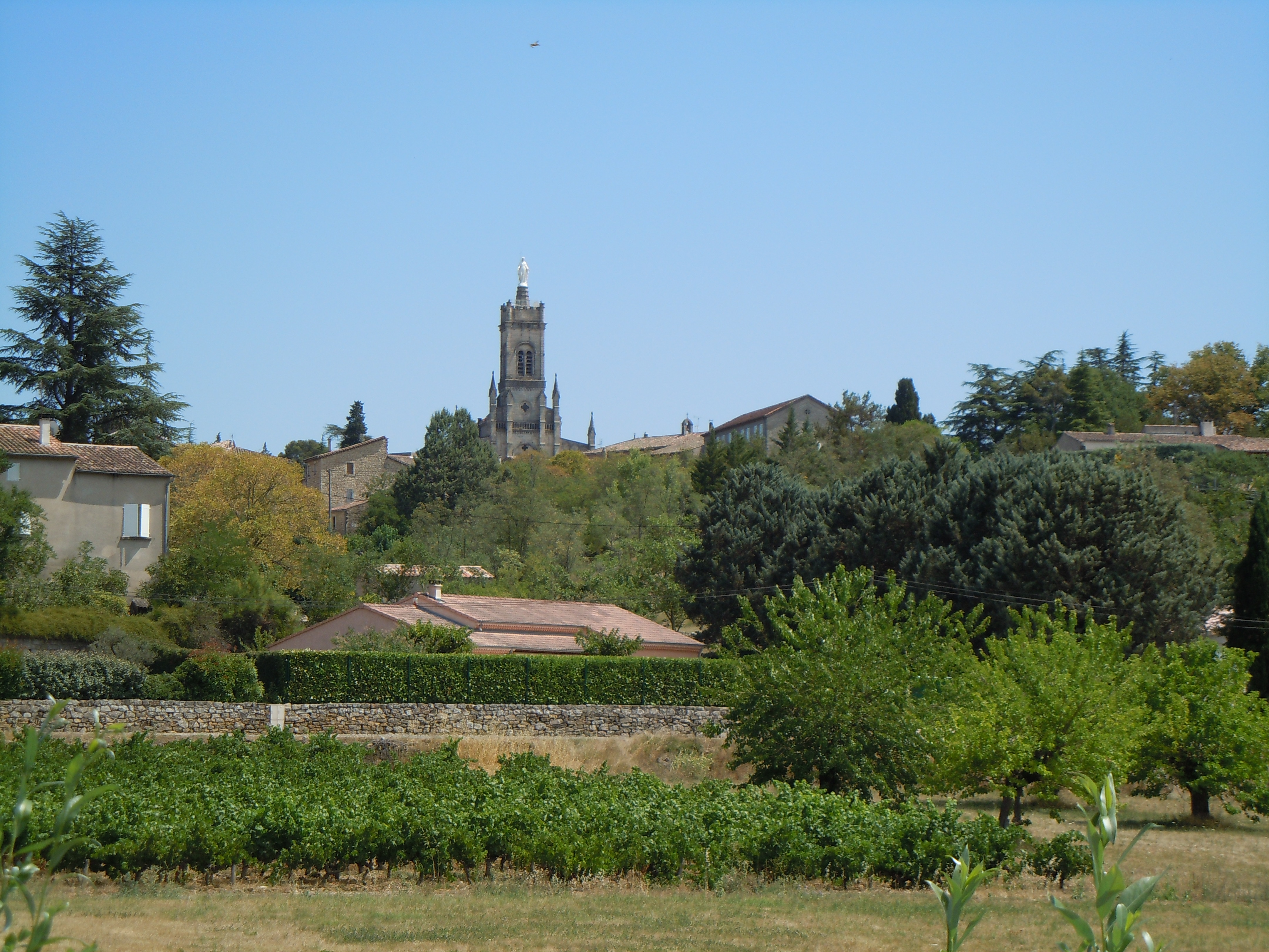 Notre-dame de Bon Secours - vue du hameau - Lablachère - Ardèche - France